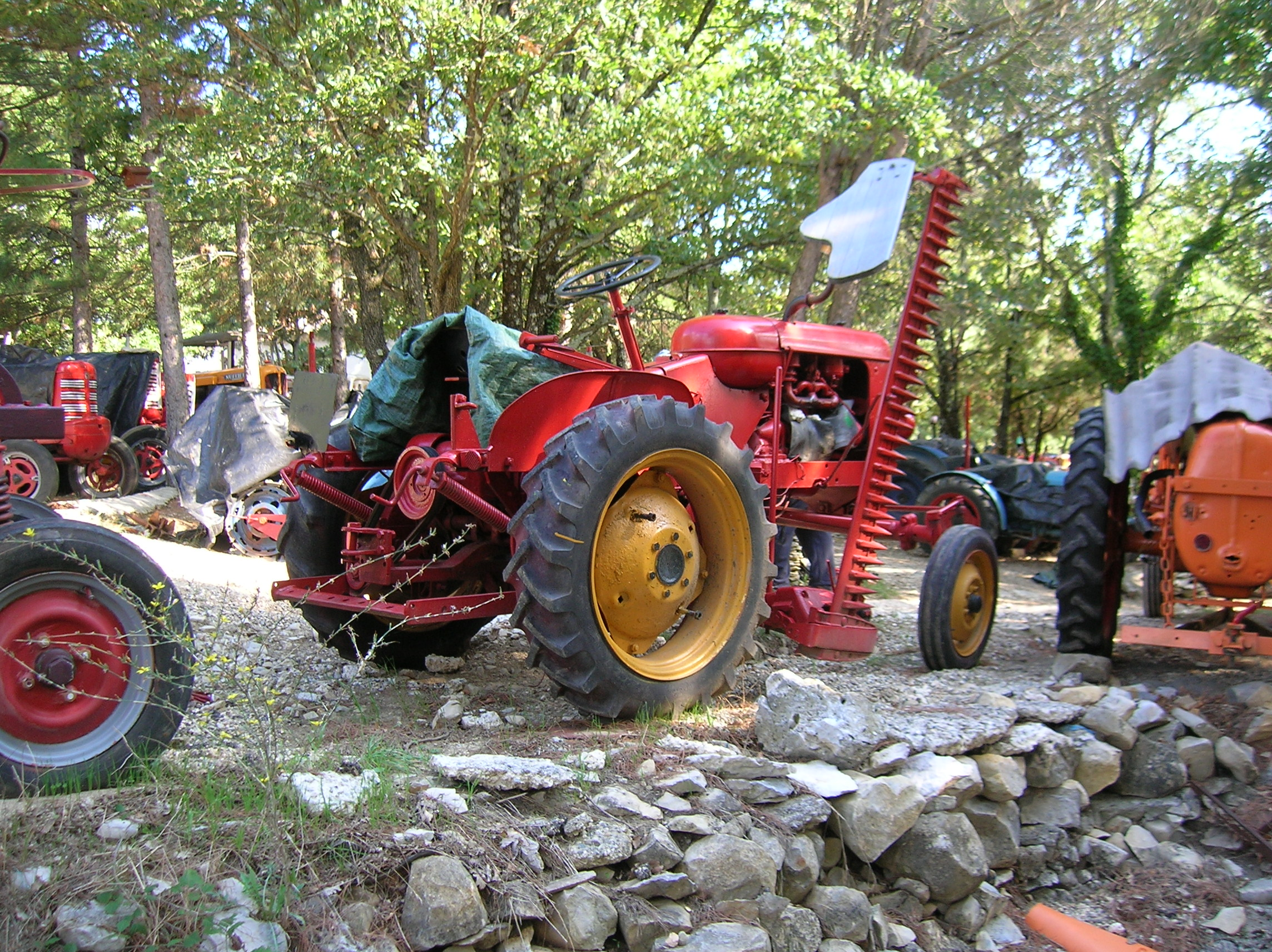 "Maison de retraite du Mont Bouquet pour anciens tracteurs agricoles", collection privée de "M. Jacky". Ce musée en plein air se trouve le long de la départementale 147, entre Navacelle et Lussan. Gard, Languedoc-Roussillon-Midi-Pyrénées, France.